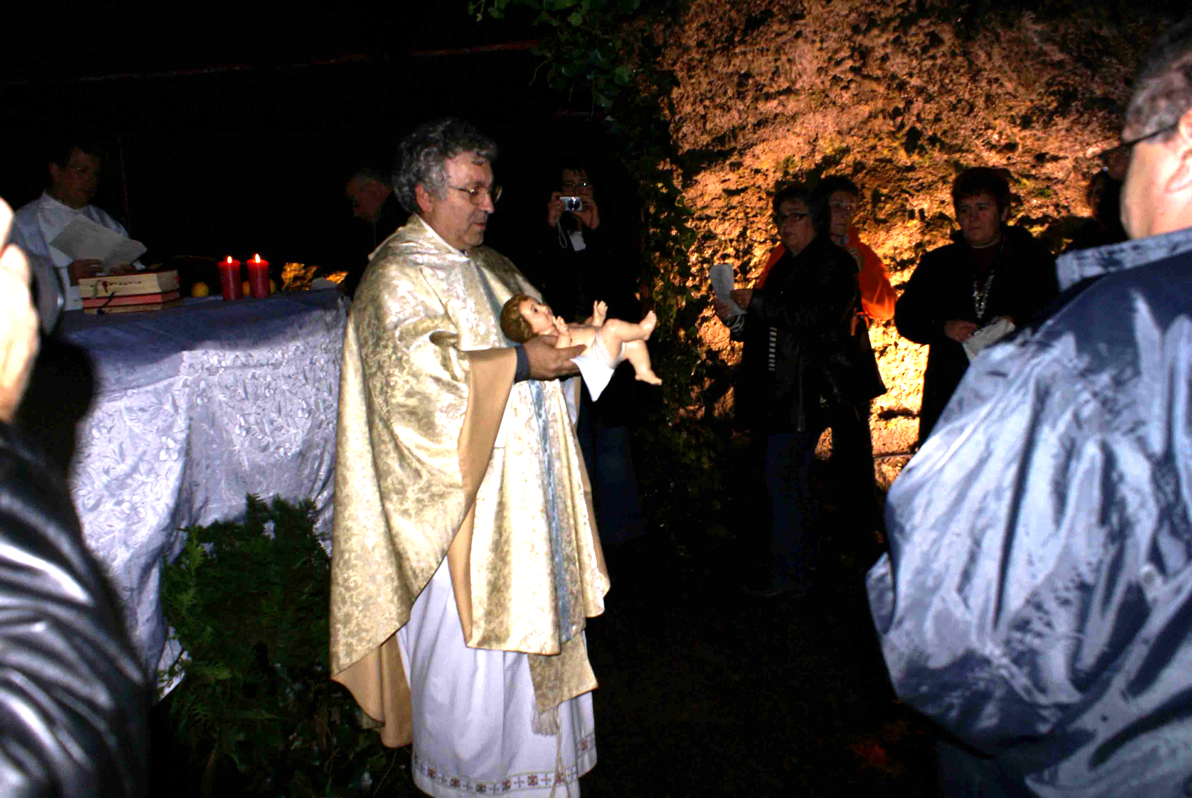 Gruta do Natal, Missa que se realiza nesta gruta no dia Natal, Angra do Heroísmo, ilha Terceira, Açores